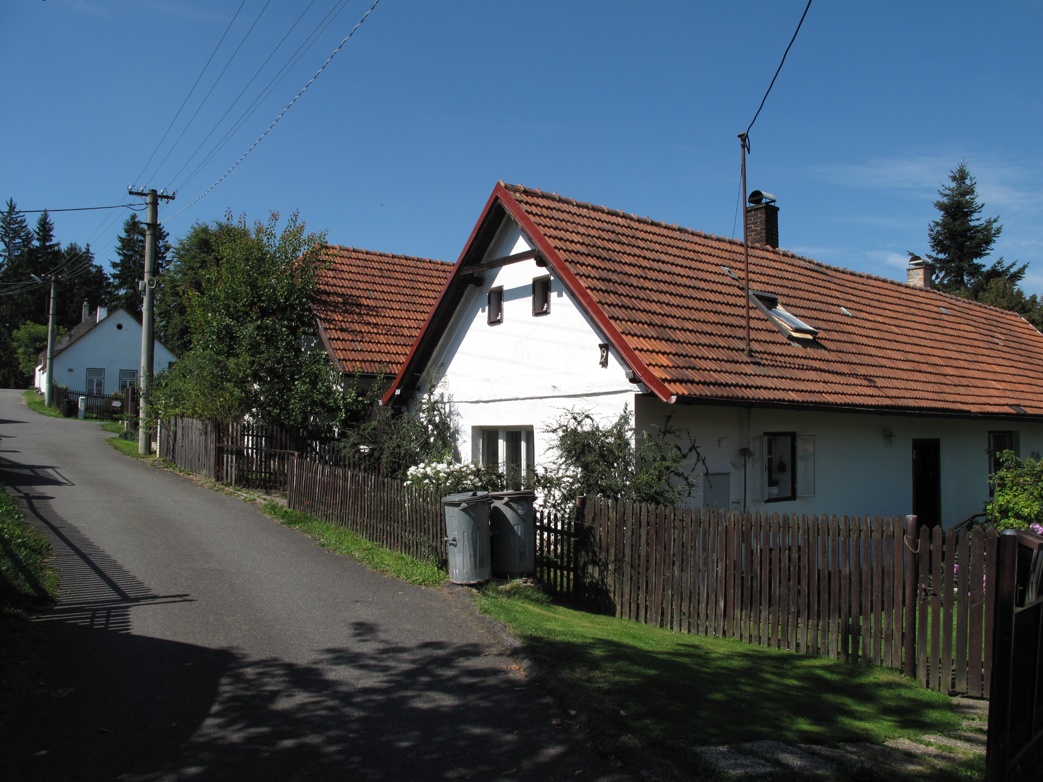 Domy v Hájku. Okres Tábor, Česká republika.